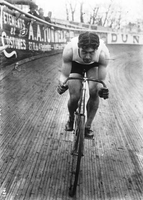 Cycliste : Schilles